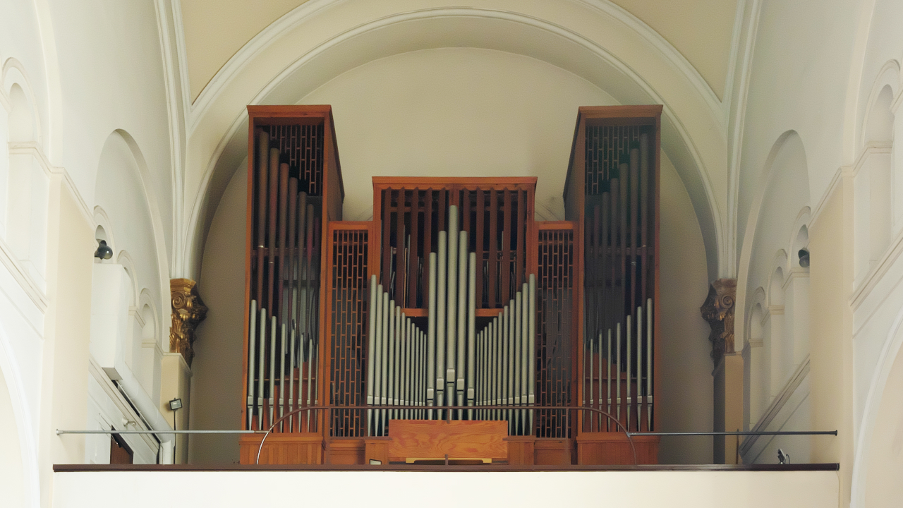 Sauer-Organ of Sankt Michael (Berlin)